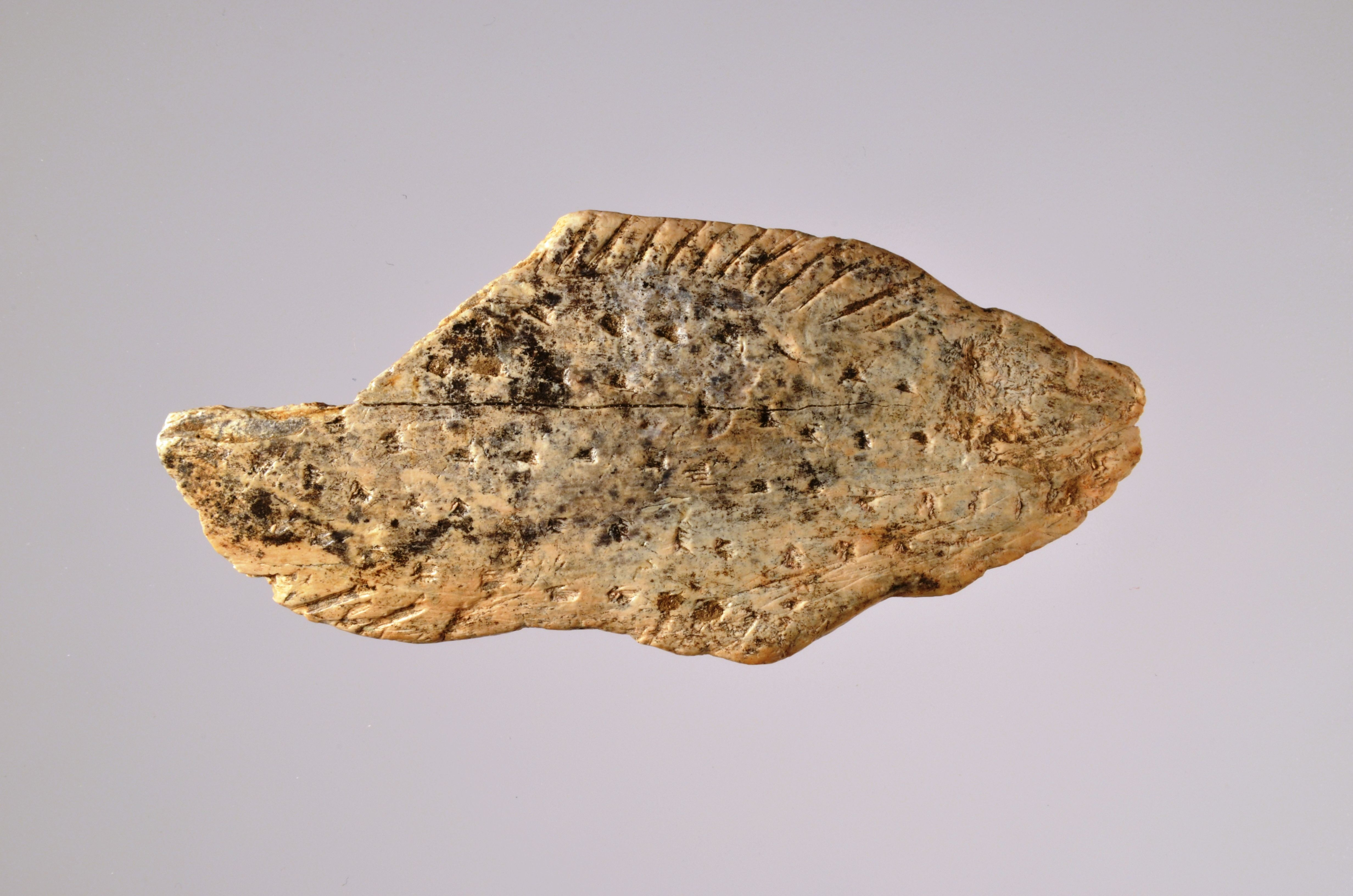 Fisch und so weiter